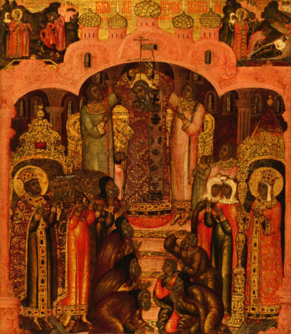 Feast of the Cross. Воздвижение Креста.